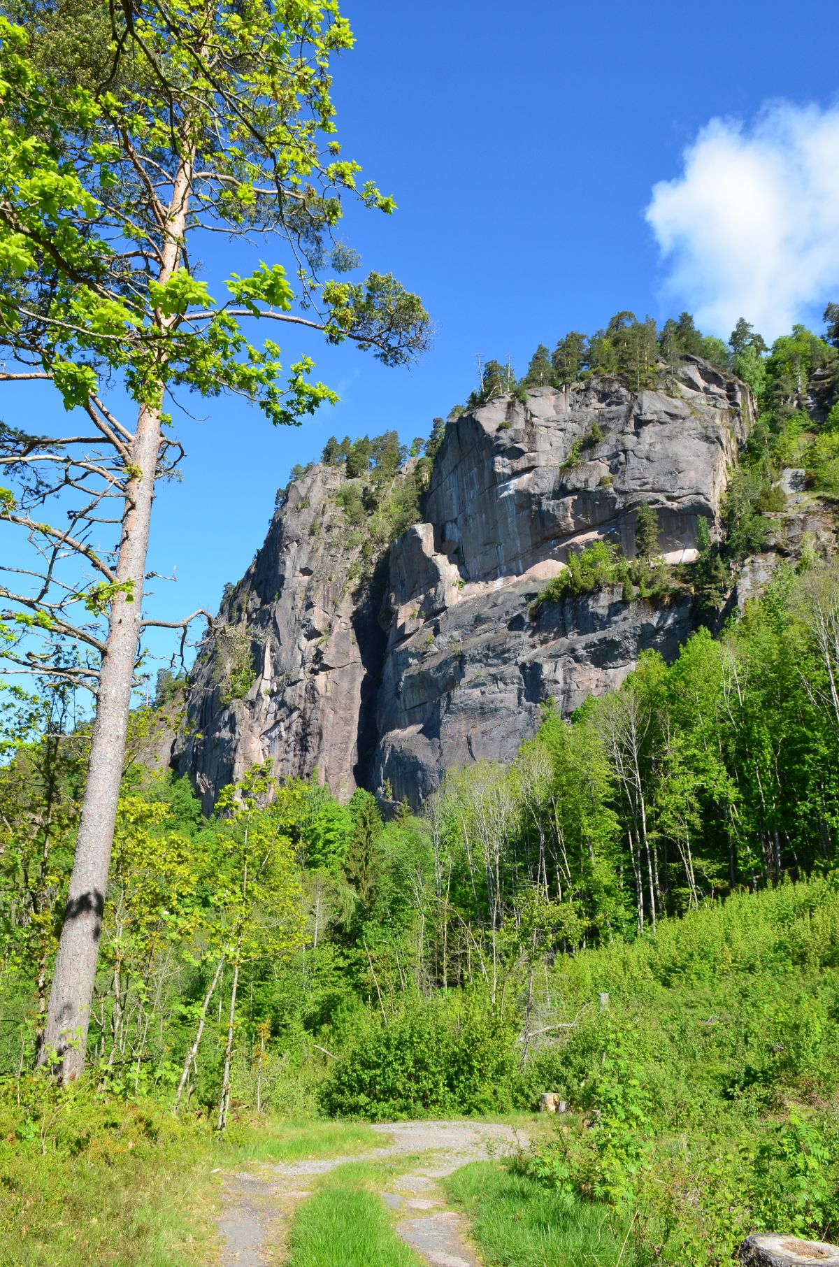 Innerst i Farris troner Falkeberget.